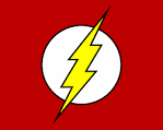 Logo de flash